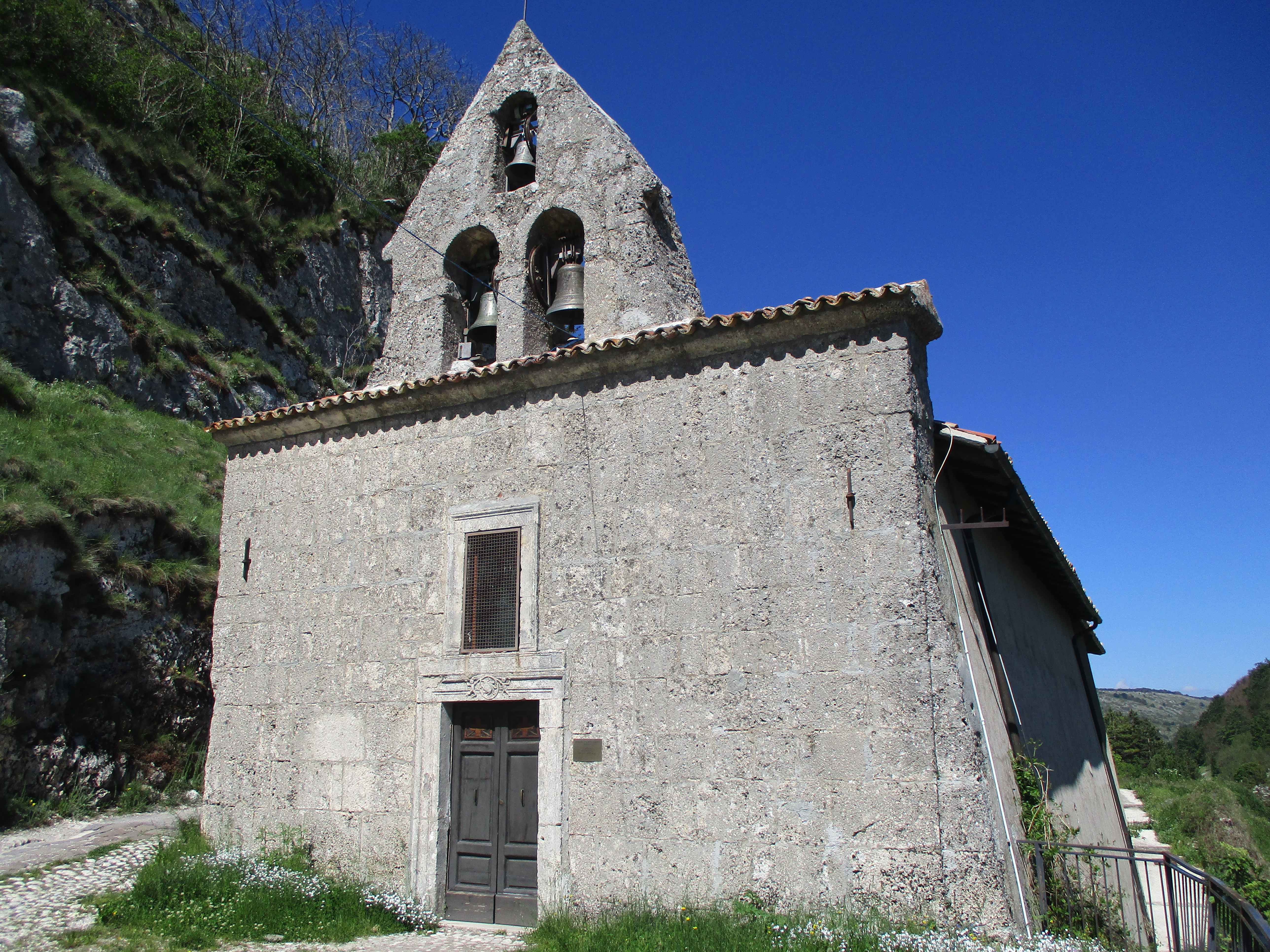 Chiesa della Madonna delle Grazie a Rovere